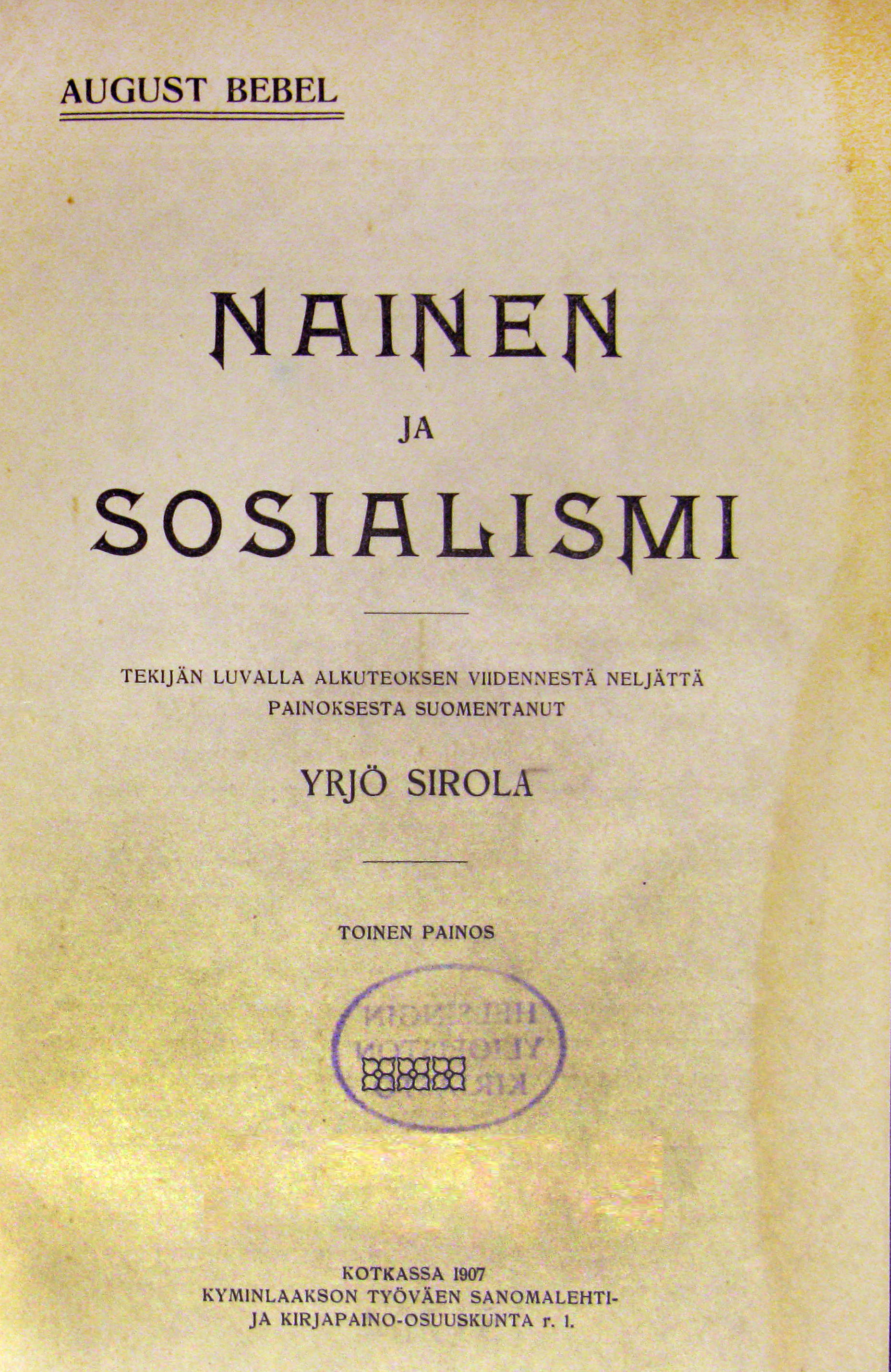 August Bebelin "Nainen ja sosialismi" -teoksen 2. suomenkiel. painos (1907)